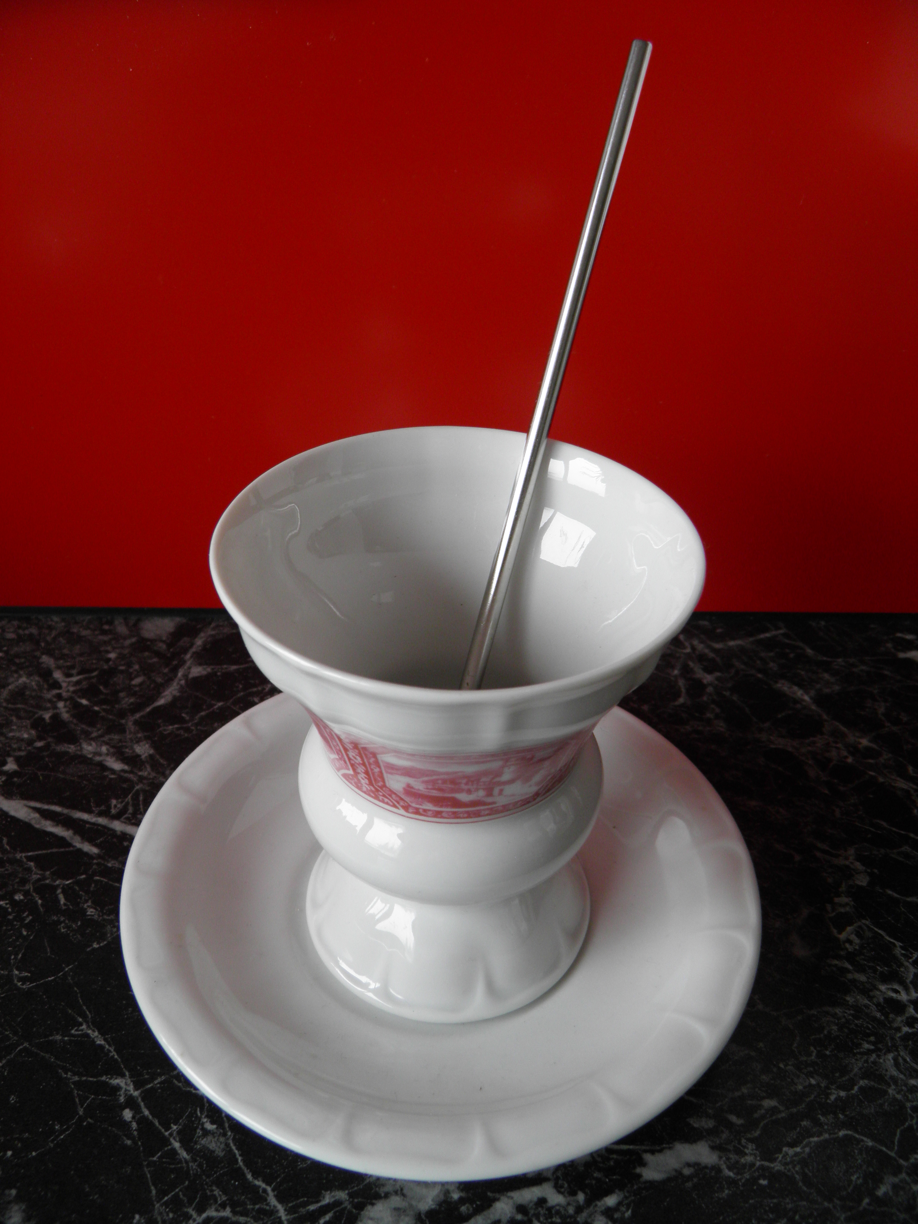 Rüdesheimer Kaffeetasse mit Irish-Coffee-Löffel